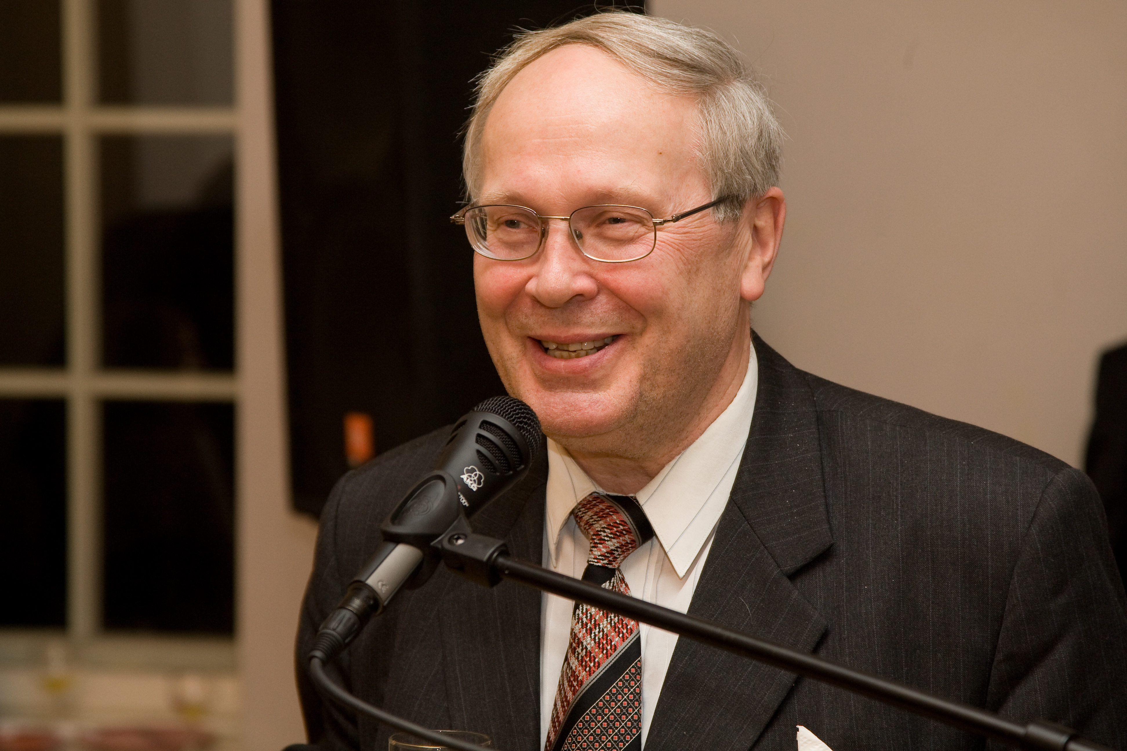 Inimese bioloogia ja geneetika professor Aavo-Valdur Mikelsaar 2008. aastal korporatsioon Sakala saalis (Veski tn 69) emeriitprofessor Tiina Talviku riikliku teaduspreemia tähistamisel.